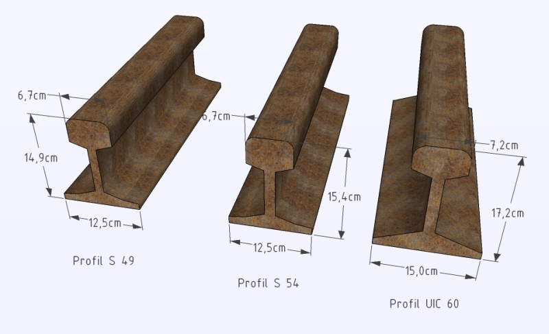 Schienenprofile heute Vergleiche Webseite